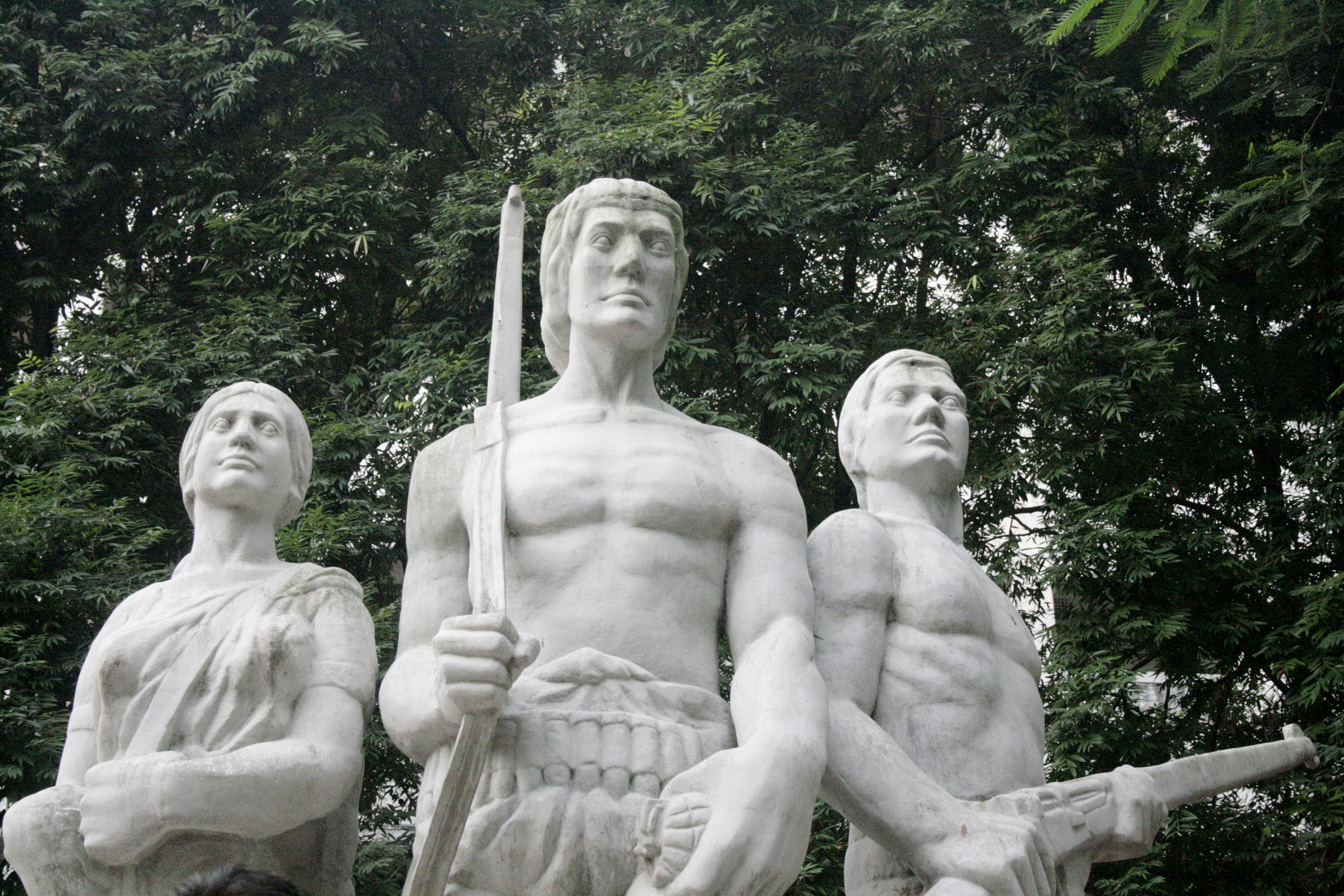 অপরাজেয় বাংলা